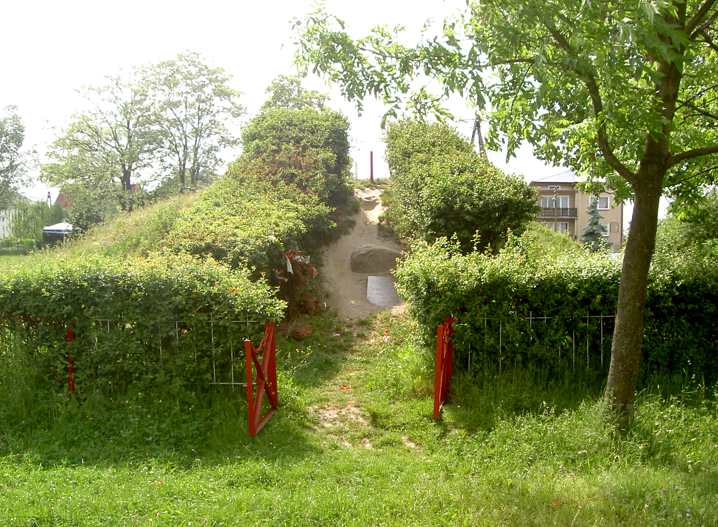 Tarnogród, Poland • Kopiec Kościuszki / Kościuszko Mound